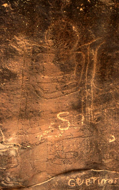 Gravures préhistoriques de la région de Djelfa, Algérie